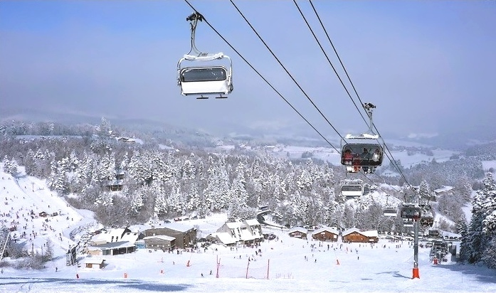 La station de Chalmazel (Loire, Rhône-Alpes, France) et son télésiège à bulles des Jasseries.